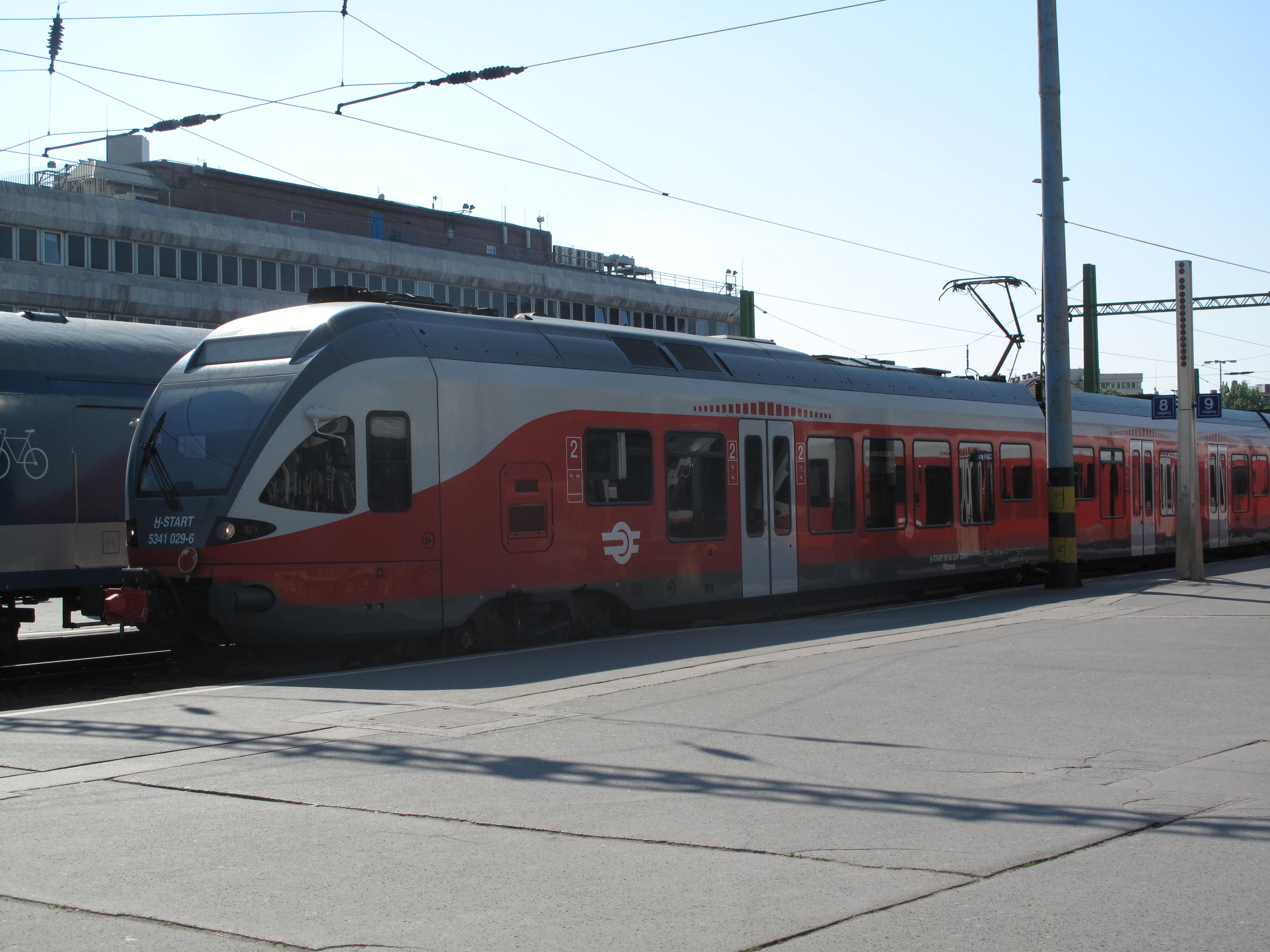 Budapešť